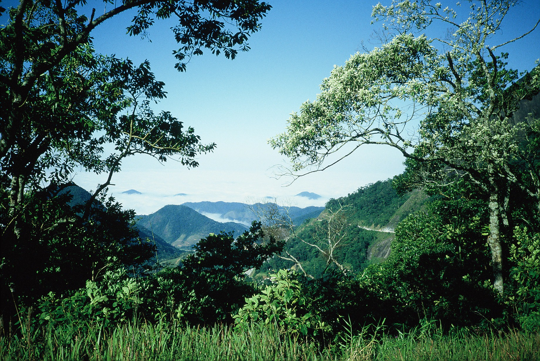 Gebirge, Rio de Janeiro, Brasilien, Serra da Bocaina